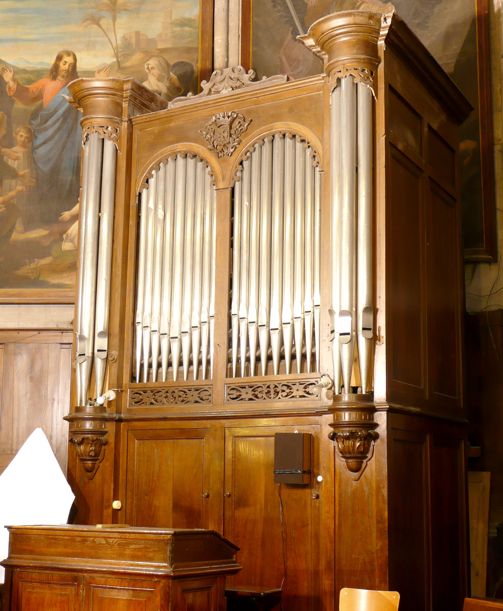 A Castelnaudary (Aude, France), dans la collégiale Saint Michel, orgue de choeur construit en 1865 par Thiébaut Maucourt.